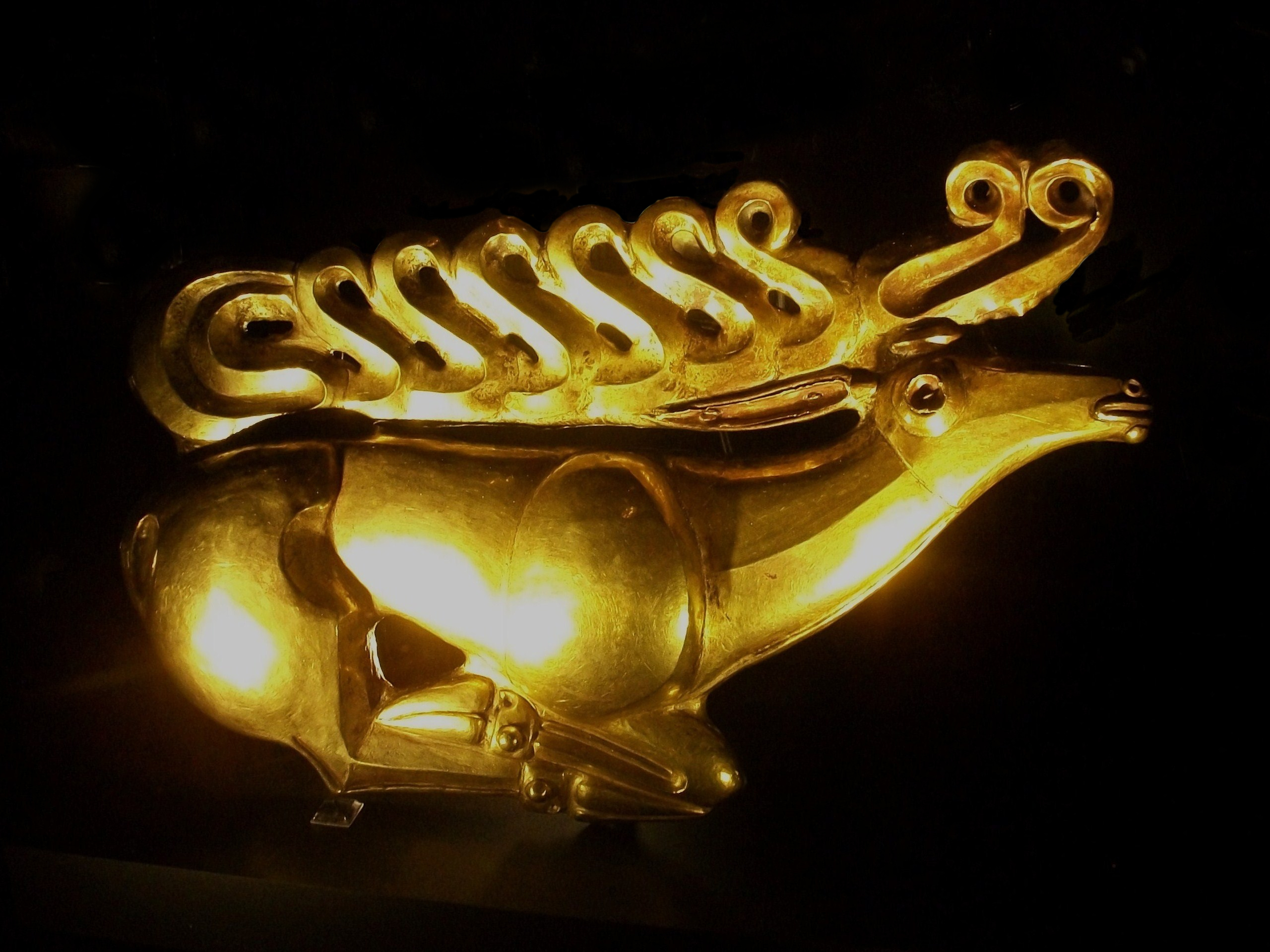 Aquesta placa d'or en forma de cérvol tombat, datada en el segle VII aC i trobada en el túmul des Kostromskoy, a Kuban, és una de les obres més conegudes de l'art escita, en què aquest tipus de figures constituïa un motiu decoratiu molt freqüent. La figura del cérvol està realitzada de manera molt conscisa. La seua superfície està modelada amb plans precisos amb una aresta longitudinal característica al coll, la qual cosa es considera un dels trets més expressius de la tradició artística escita del període antic primerenc, tal vegada heretat de la tècnica de tallat en fusta, os, banya o pedra, tan popular en la tradició artesana dels pobles nòmades. Són molt característics l'allargament de les proporcions de la figura i la posa del cèrvol, amb els peus encollits el coll estirat cap avant i les banyes esteses al llarg de l'esquena amb nombrosos cresols en form de S. Les representacions de cérvols tombats es col·locaven en diferents objectes, fins i tot a les armes. A hores d'ara, la hipòtesia més acceptada és que aquestes plaques (o d'altres semblants) servien com a adornaments dels estoigs escites per als arcs i les fletxes. La peça fou fotografiada a l'exposició Ermitage. Tresors de l'arqueologia russa al MARQ.